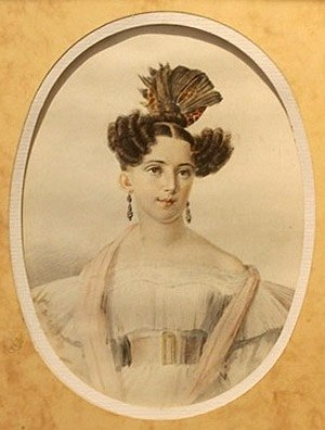 Юлии Андрэ (1816—1838), жена В. И. Даля